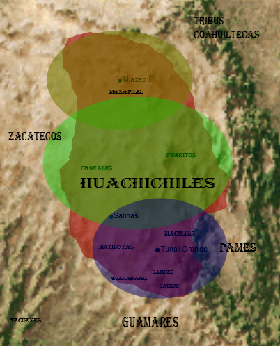 Ubicación aproximada de algunas tribus guachichiles.